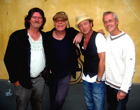 Den Gule Negl, 2008.